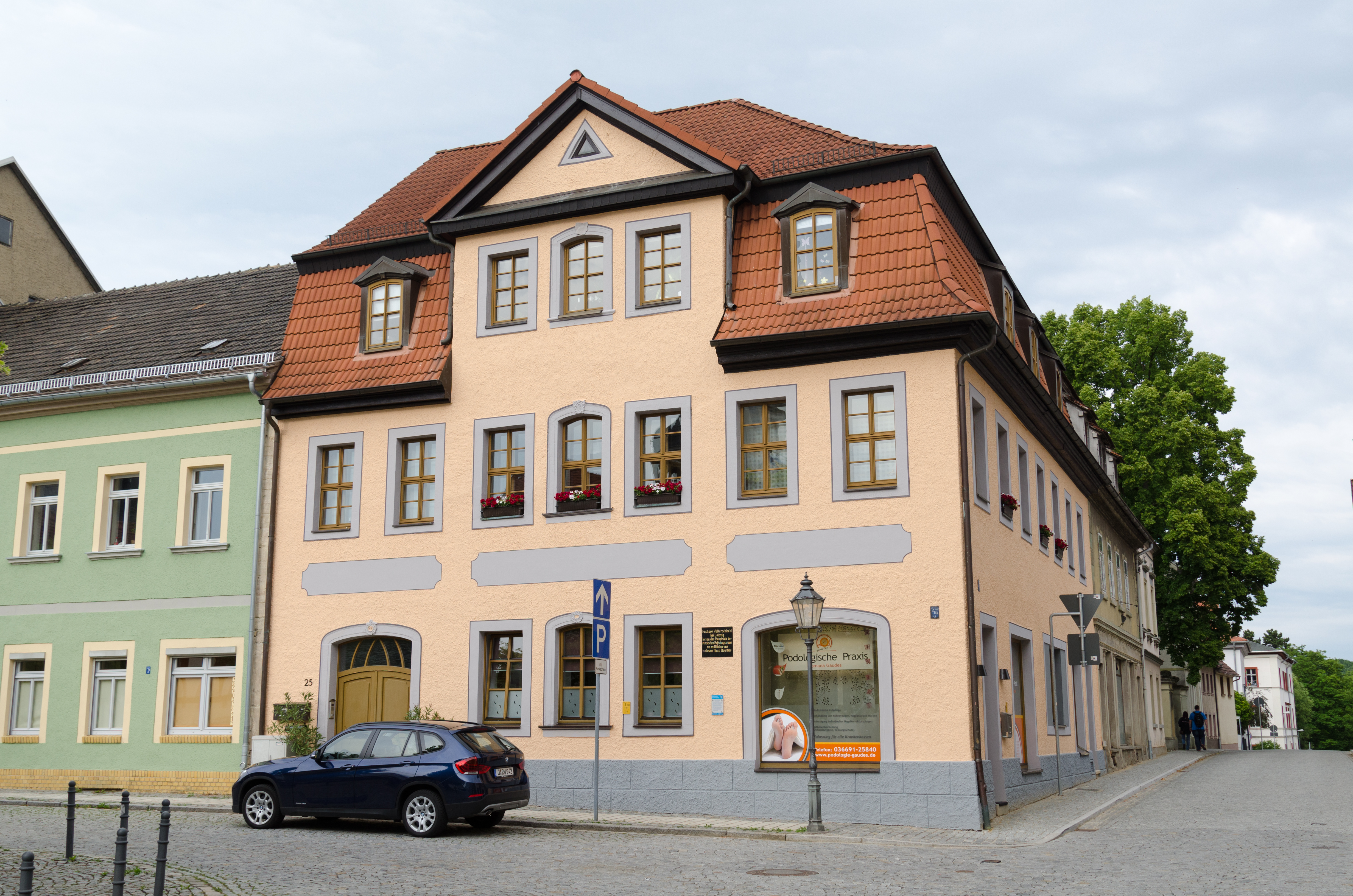 Eisenberg (Thüringen), Markt 25